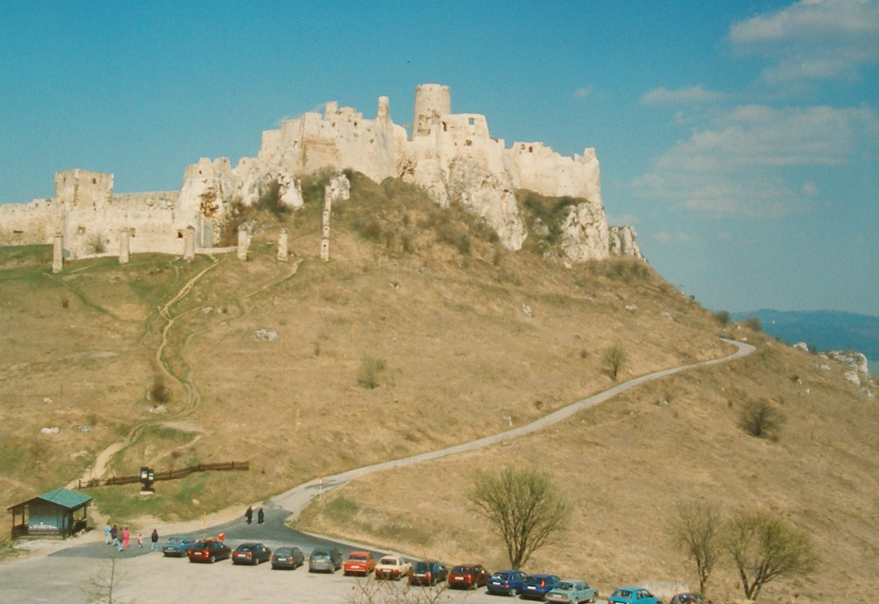 Spišský hrad pri mestečku Spišské Podhradie, región Spiš.